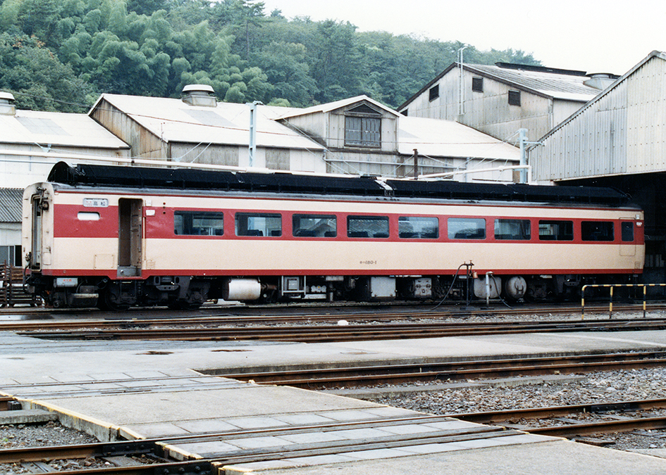 国鉄 キハ180-1 高松運転所にて（許可を得て撮影）